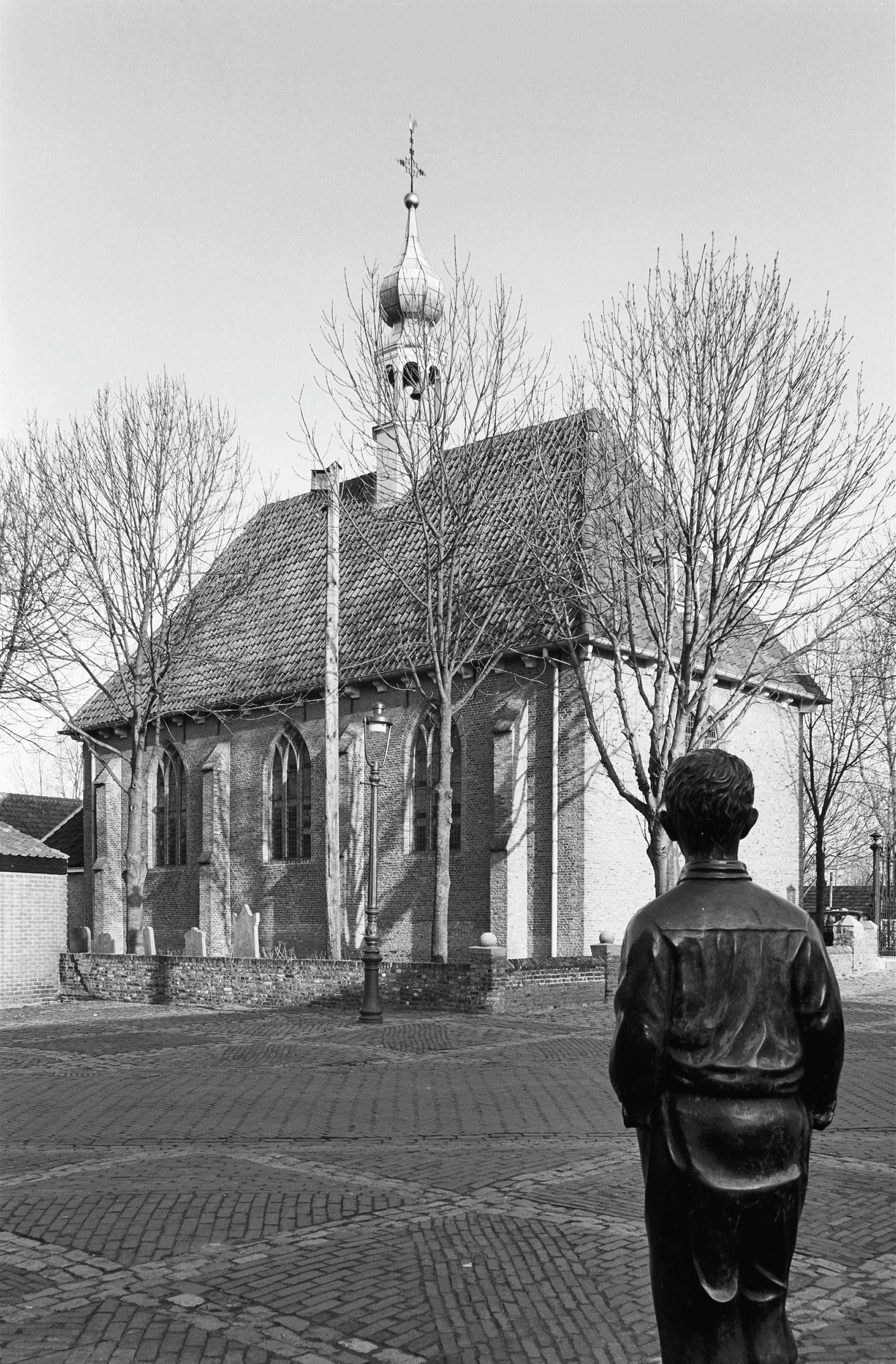 Nederlands Hervormde Kerk: exterieur zuid-oostelijke gevel